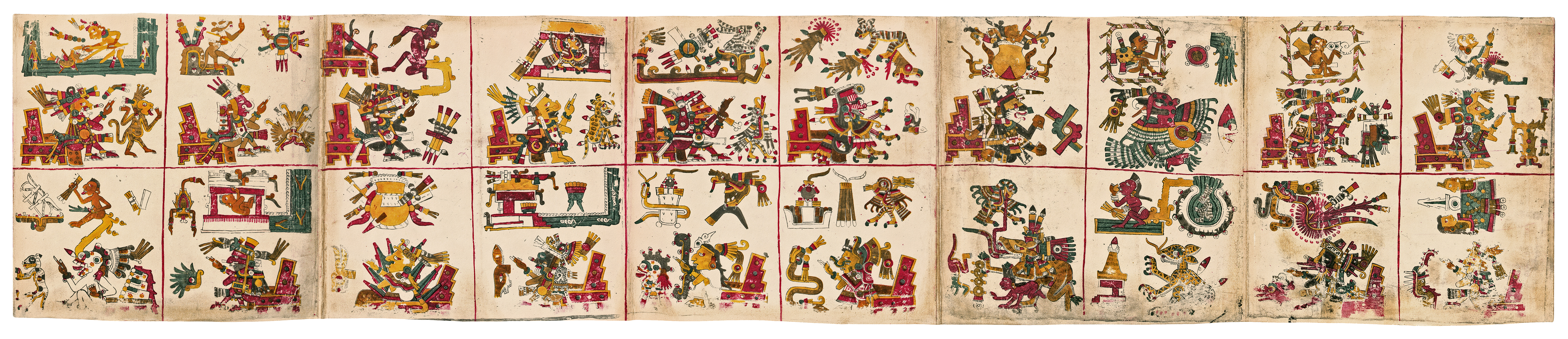 Pages 9 à 13 du Codex Borgia (fac-similé). Les relations entre les 20 signes du Tonalpohualli et les divinités aztèques. Foundation for the Advancement of Mesoamercan Studies, Inc. (FAMSI).